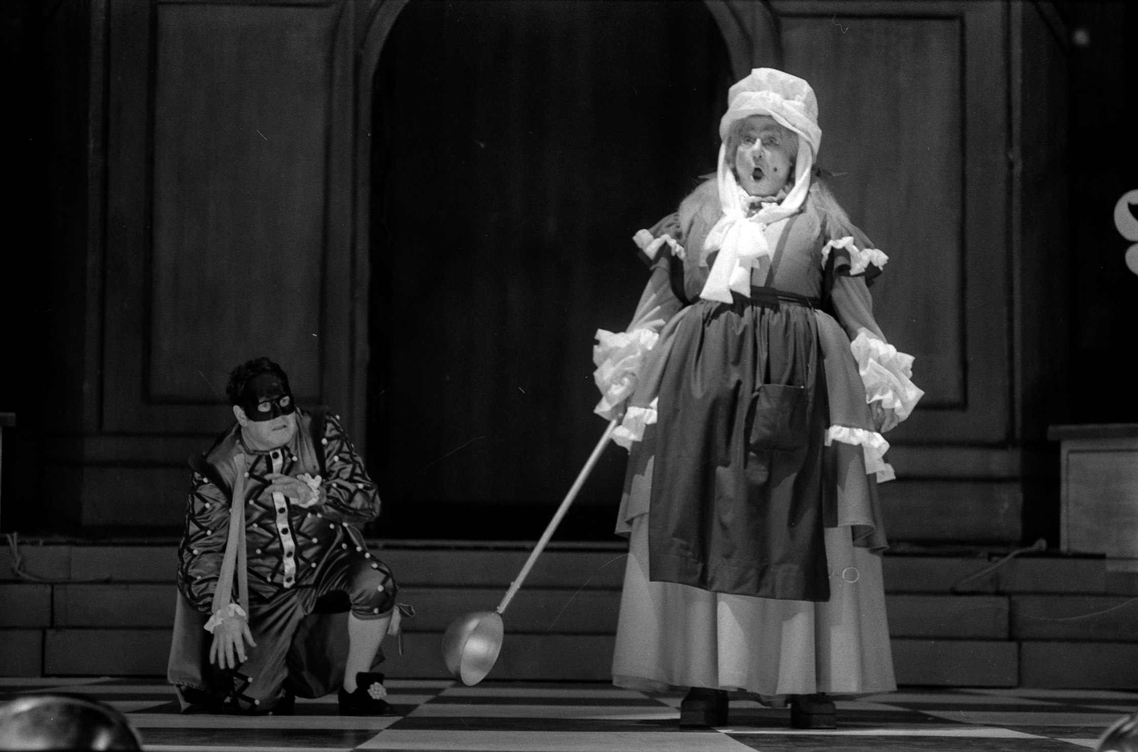 Théâtre du Capitole. Le 25 Février 1971. Vue de la représentation de L'amour des trois oranges au théâtre du Capitole.